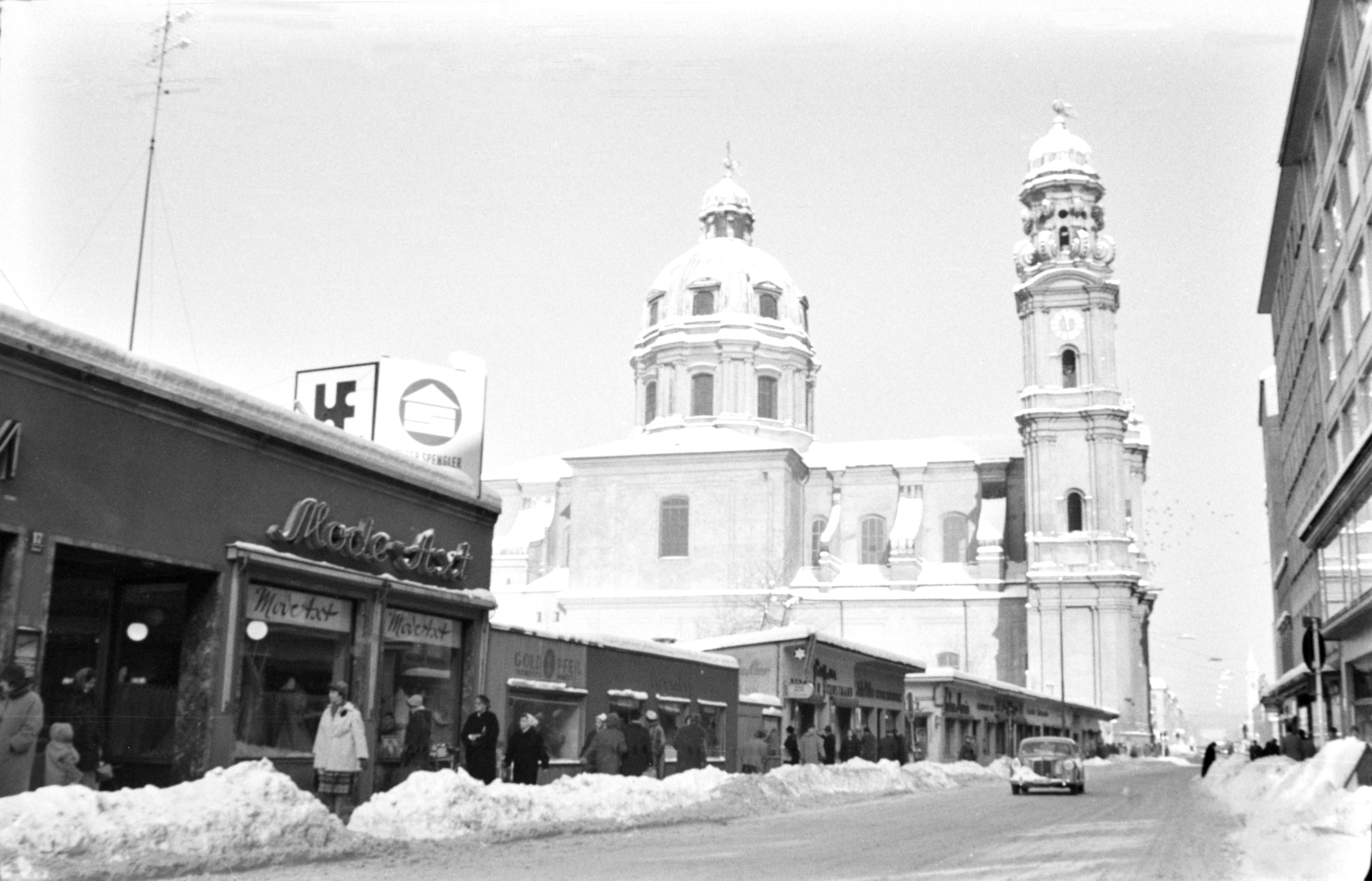 München. Blick in die Theatinerstraße im Winter des Jahres 1959. An jenem Wochende war ganz besonders viel Schnee gefallen. (Schneefall Messstation Riem: 15.01 - 21,7mm, 16.01 - 16,4mm, Schneehöhe am 16.01 45cm, 19.01 - 31cm) Die ehemaligen Klosteranlagen entlang der Theatinerstraße waren in dieser Zeit nach Kriegszerstörung bereits abgeräumt, und durch flache einfache Bauten ersetzt. In diese waren kleine Ladengeschäfte eingebaut. Für die zukünftige neue Bebauung waren bereits Bautafeln gestellt. Die Baufirmen Held & Francke und Spengler.